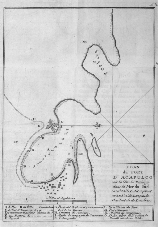 [Illustrations de Voyage autour du monde] Auteur : George Anson Éditeur : Henri-Albert Gosse et Compagnie (Genève) 1750